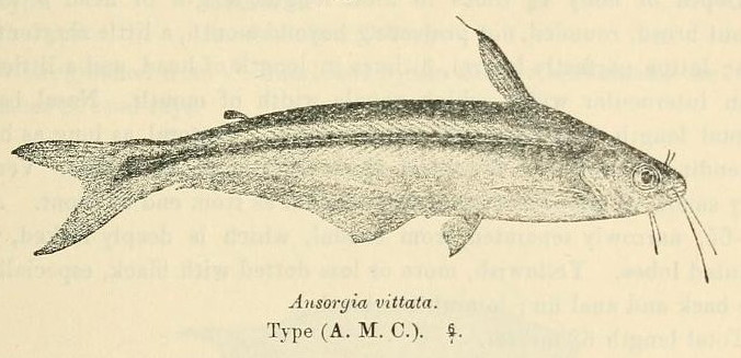 Pareutropius debauwi syn. Ansorgia vittata